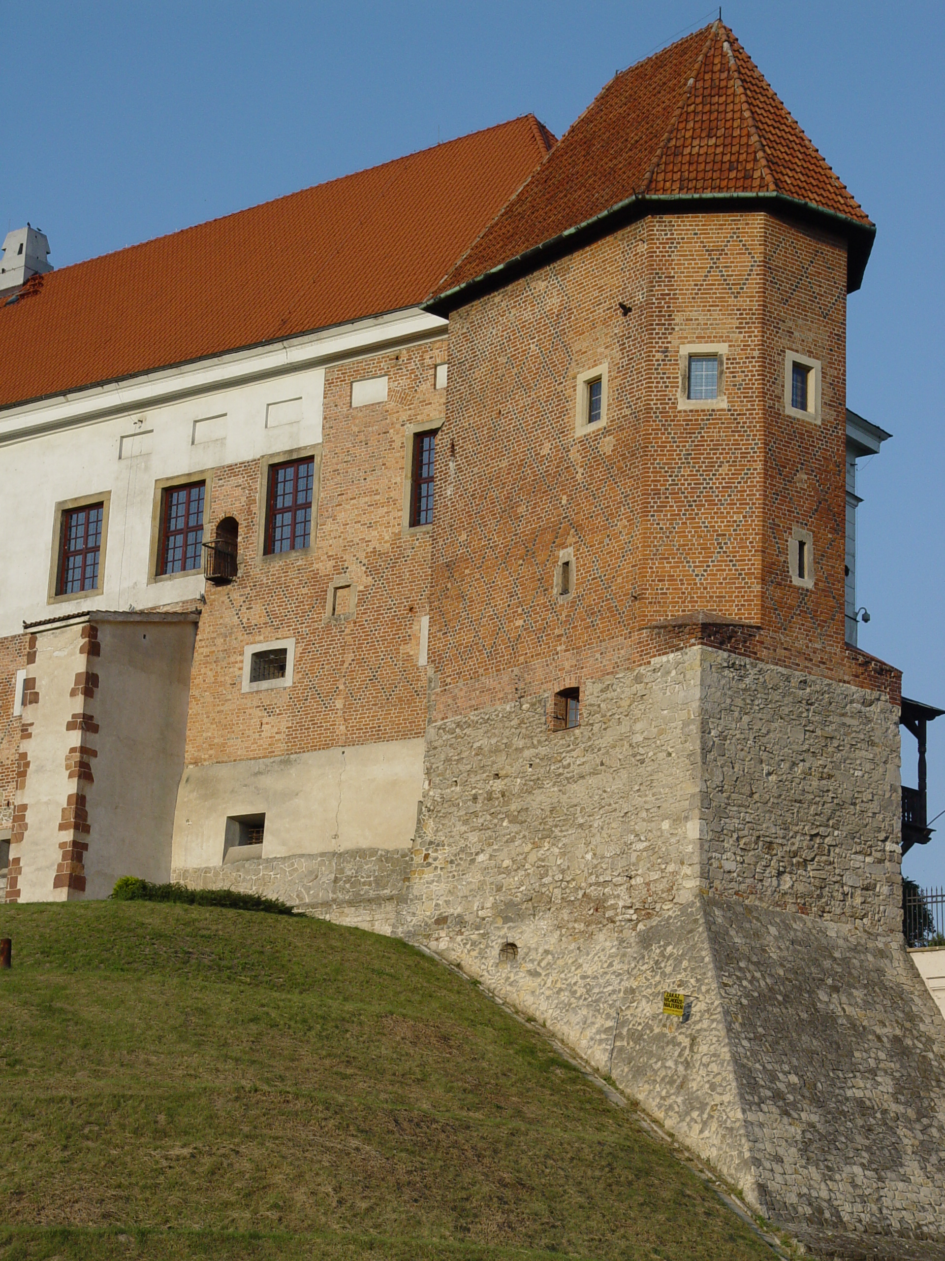 Sandomierz, ul. Zamkowa 12 - zamek królewski, obecnie muzeum okręgowe